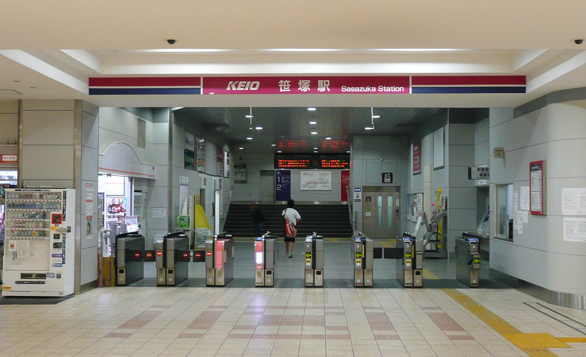 笹塚駅改札口